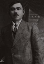 Ставре Цилев